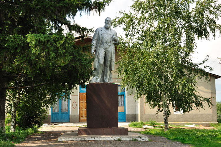 Пам'ятник Енгельсу в Мар'янівці, Гребінківський район, Полтавська область.